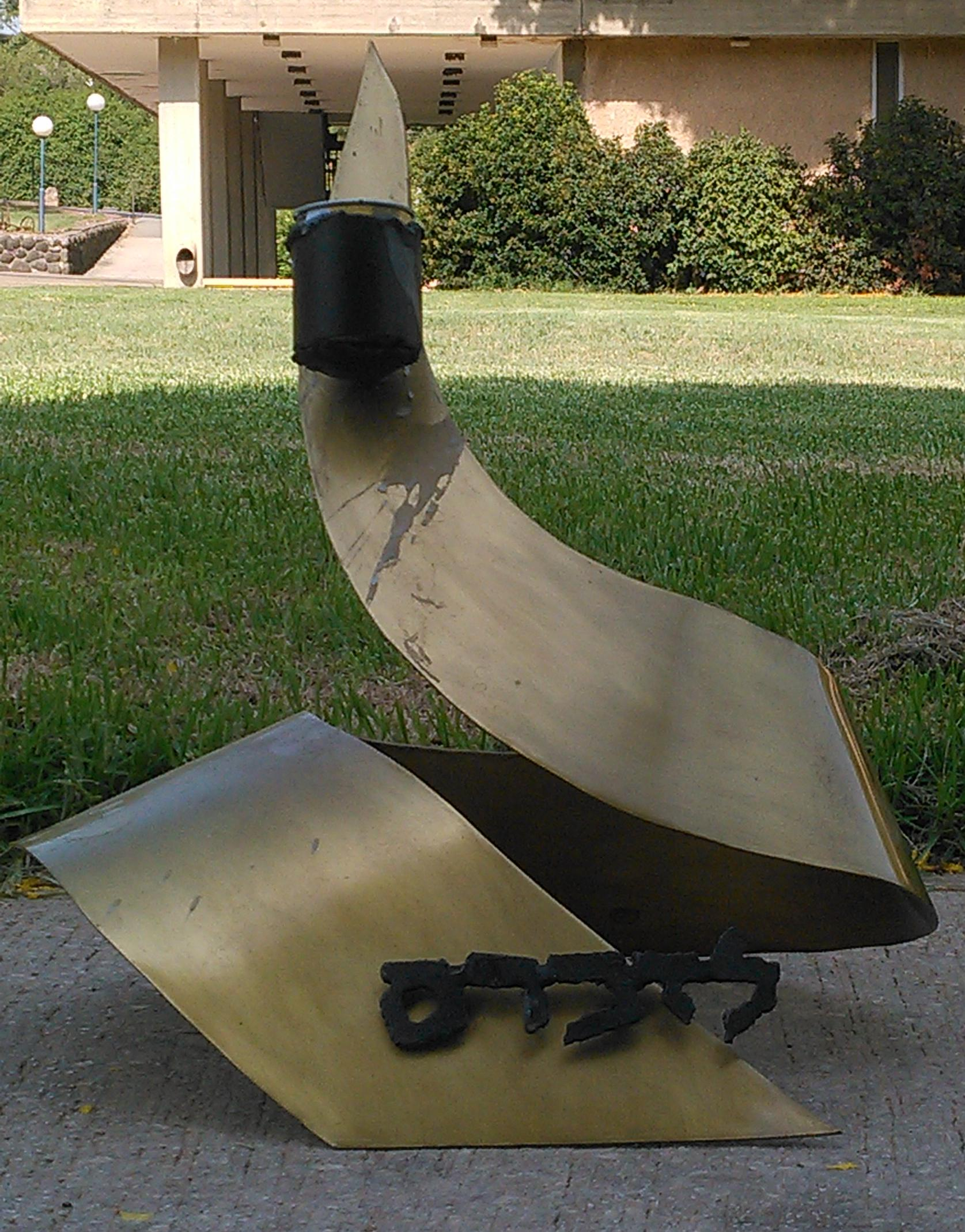 נר זכרון בקיבוץ גדות עם כתובת „לזכרם״. האותיות נוצרו על ידי אורי לבוביץ ז״ל.